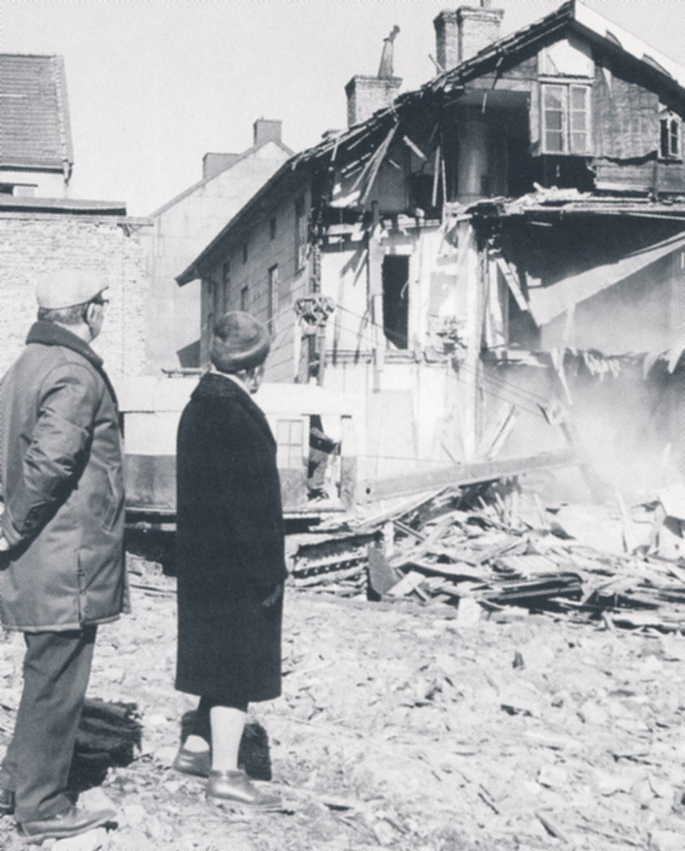 Frälsningsarméns hus på Landalavägen 7 rivs, Göteborg